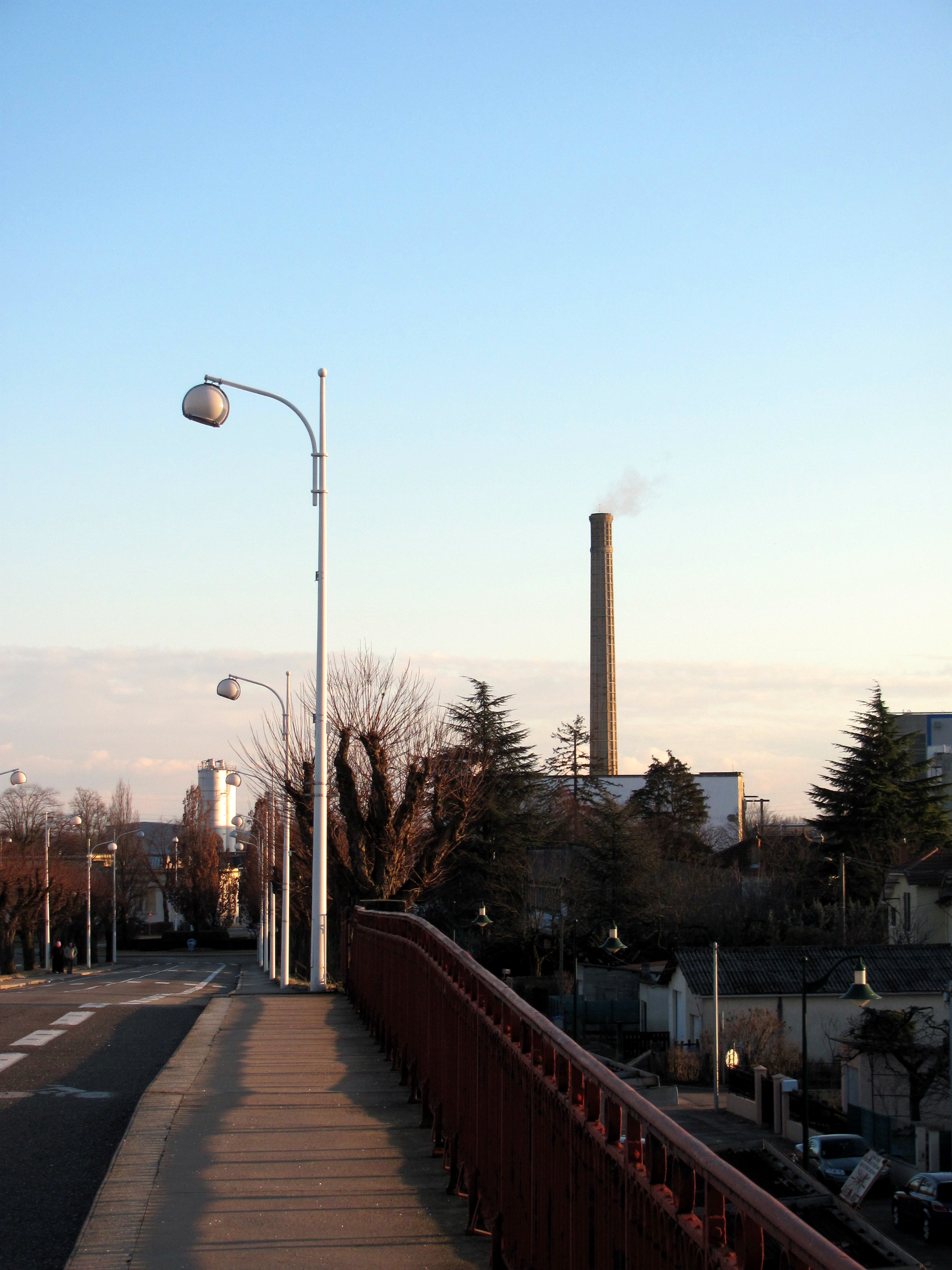 Usine de Saint-Maurice-de-Beynost et sa cheminée : prise depuis le sommet du boulevard Maurice-Cusin qui emjambe la voie ferrée.